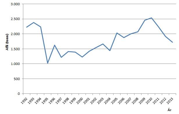 Afli leturhumars 1992-2013 (Heimild: Hagstofa Íslands, 2014)